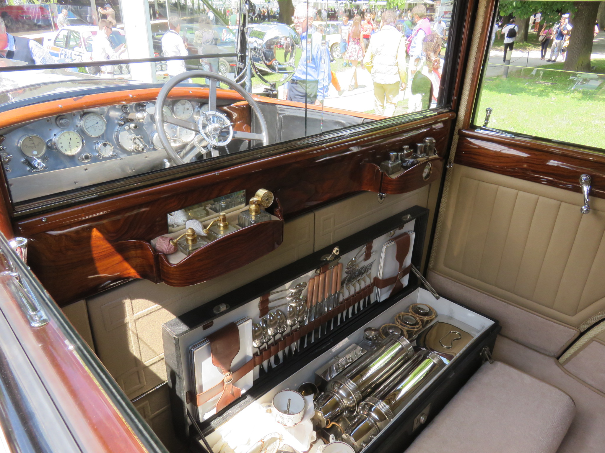 Farman A6B Coupé de Ville Million-Guiet, 1925, concours d'élégance Villa d'Este 2015